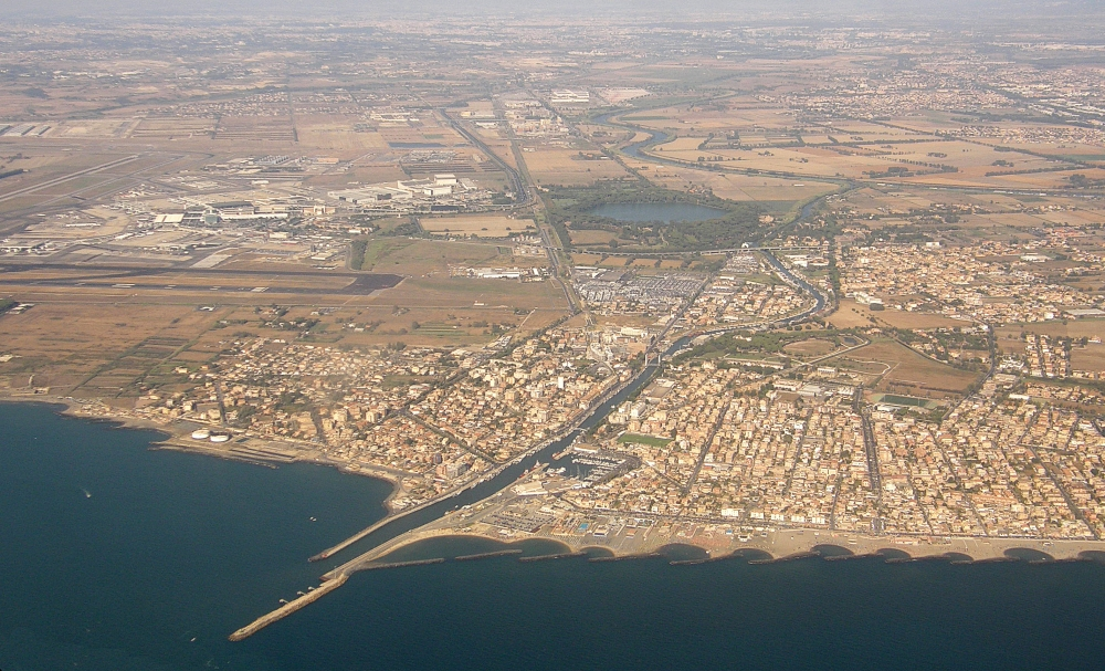 Fiumicino